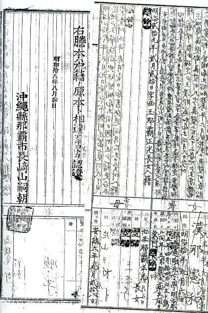 漢那憲和の戸籍